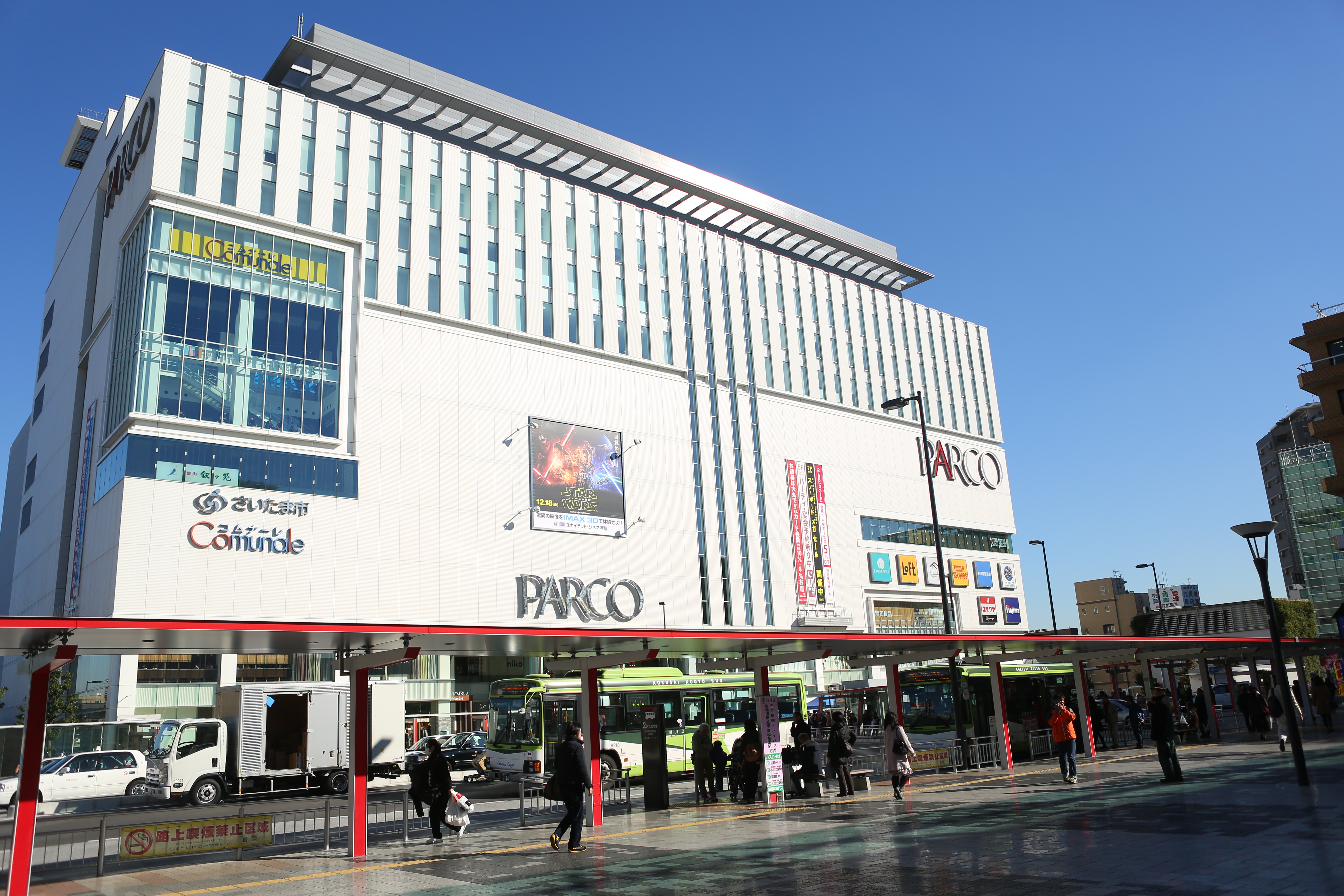 浦和駅東口広場とパルコ